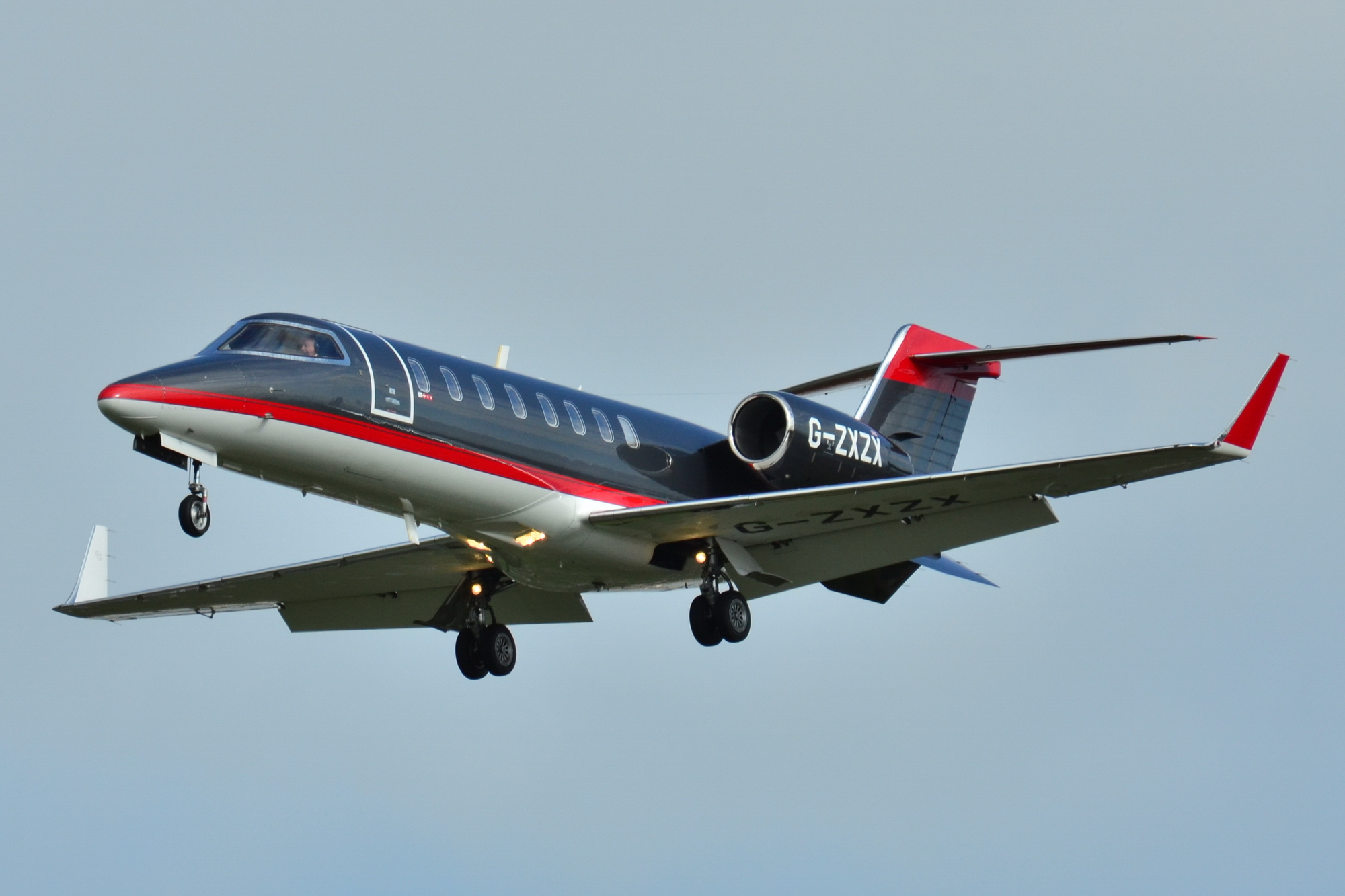 Photo prise à l'aéroport de Toulouse-Blagnac (LFBO) en France. Picture take at Toulouse-Blagnac Airport (LFBO) in France.